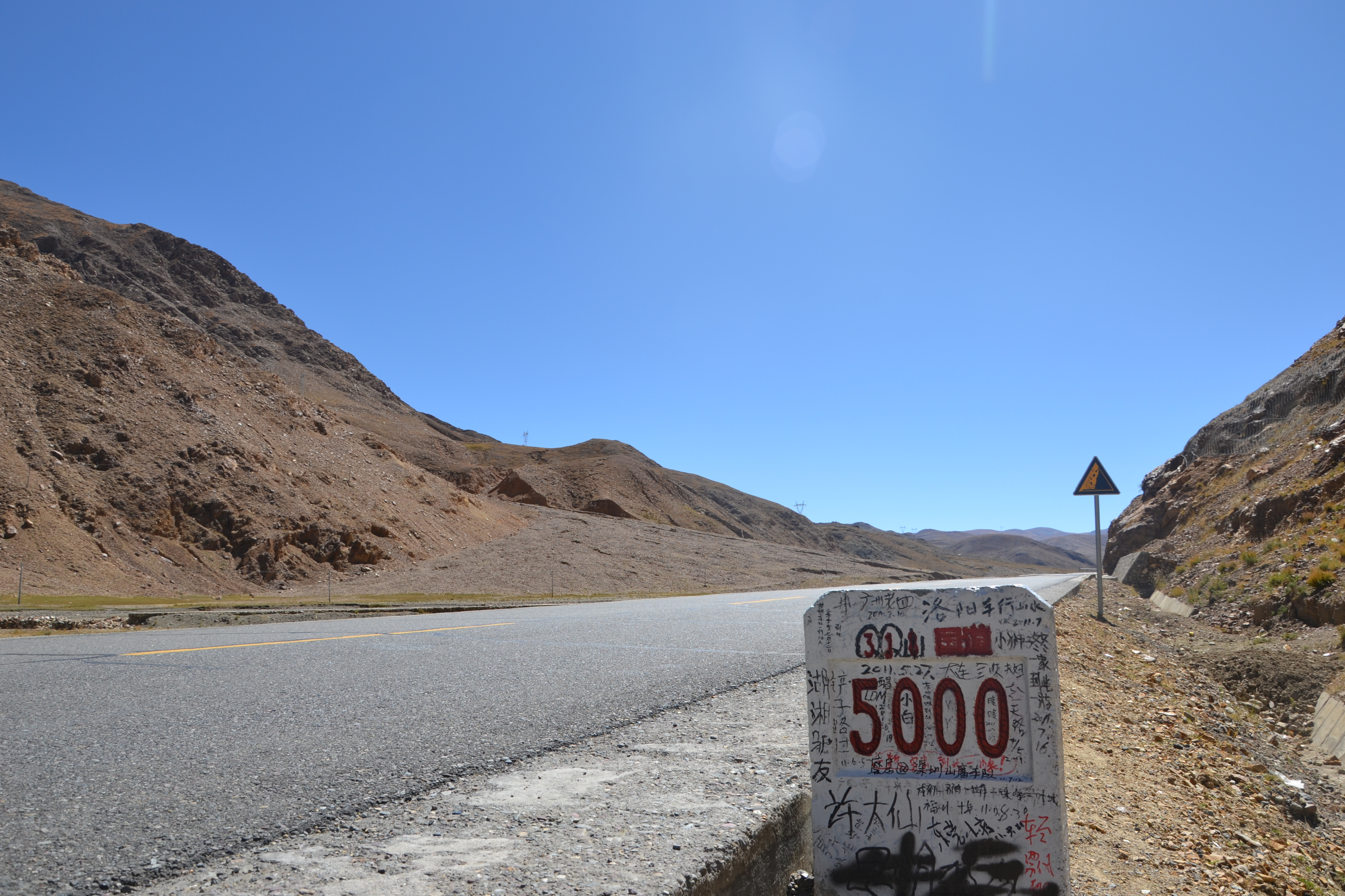 318国道 5000公里路标